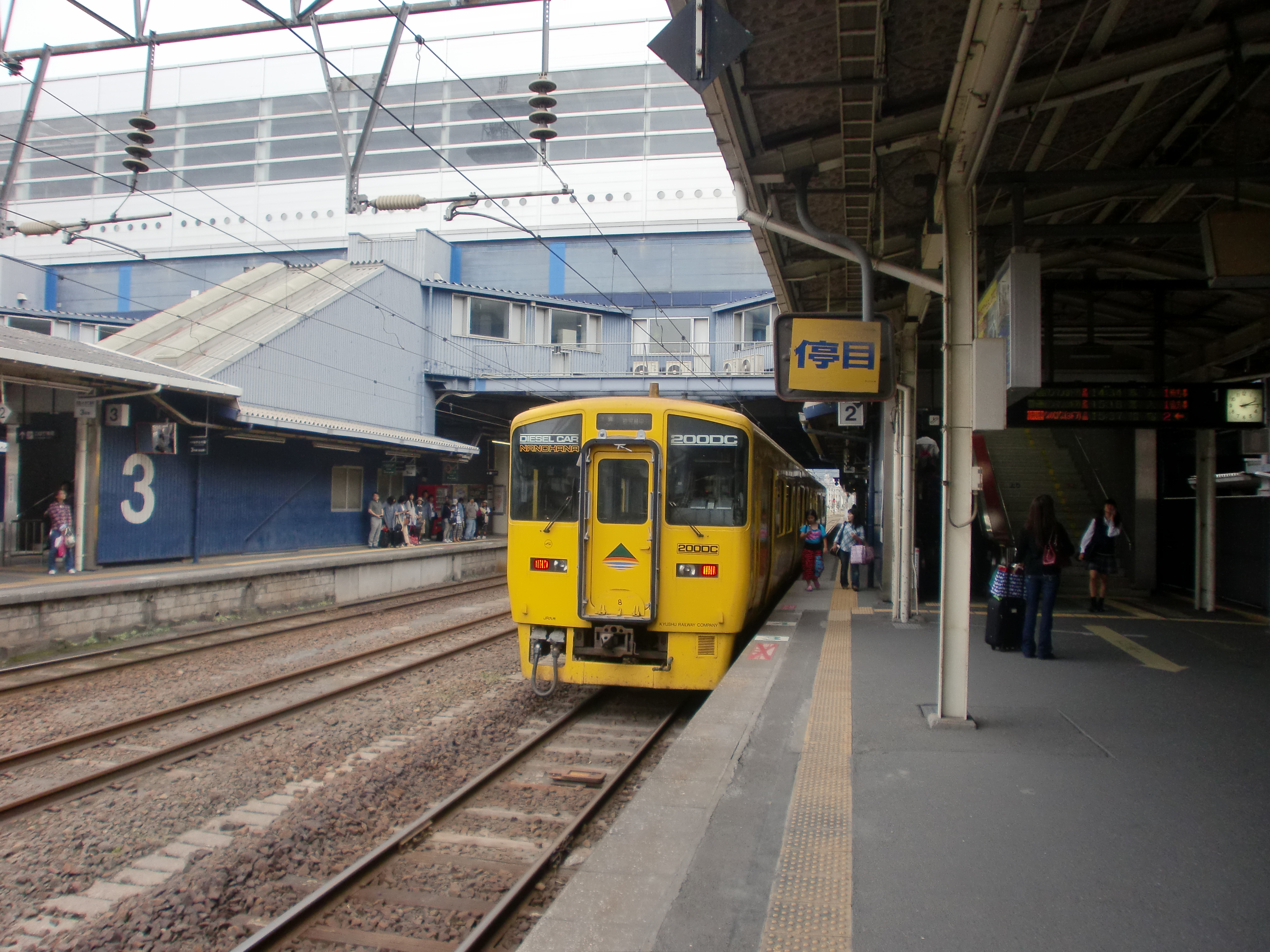 鹿児島中央駅の2番のりば。停車中の列車は指宿枕崎線の快速なのはな。